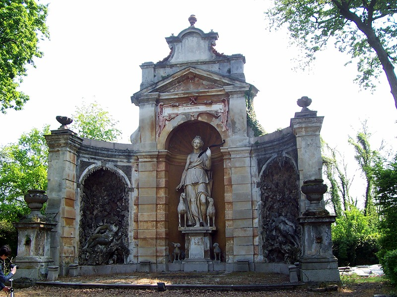 Castellazzo di Bollate - Fontana di Diana nel Parco di Villa Arconati